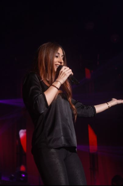 Hiba Tawaji, tournée "The Voice" à Mouilleron-le-Captif